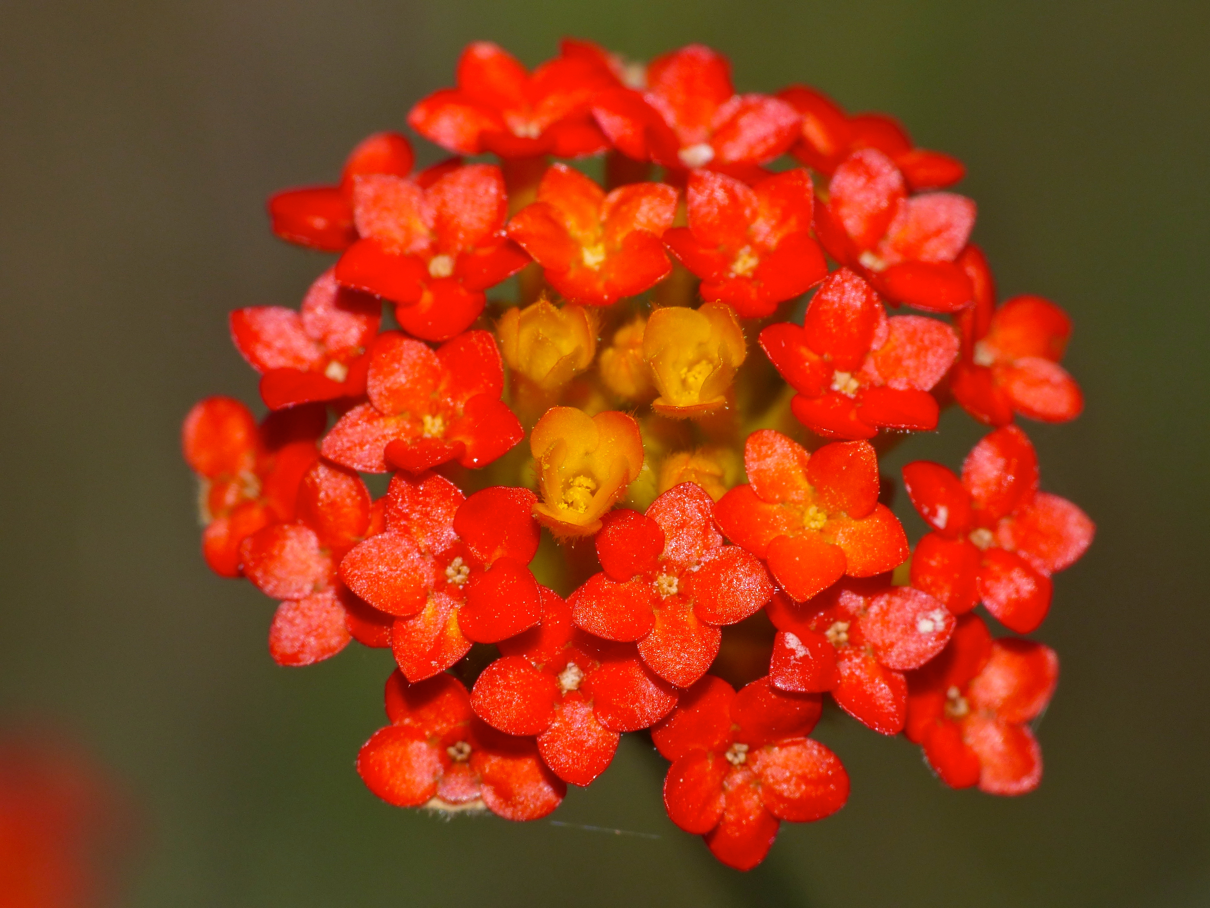 S25 (Crocodile) Road, Kruger NP, SOUTH AFRICA